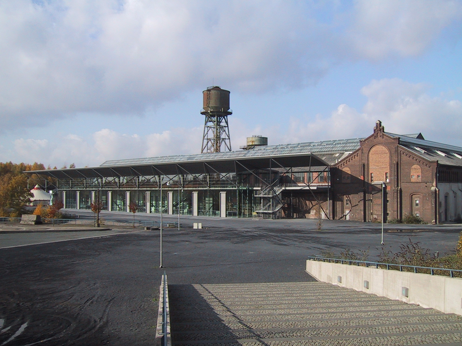 Jahrhunderthalle Bochum "Montagehalle für Kunst"